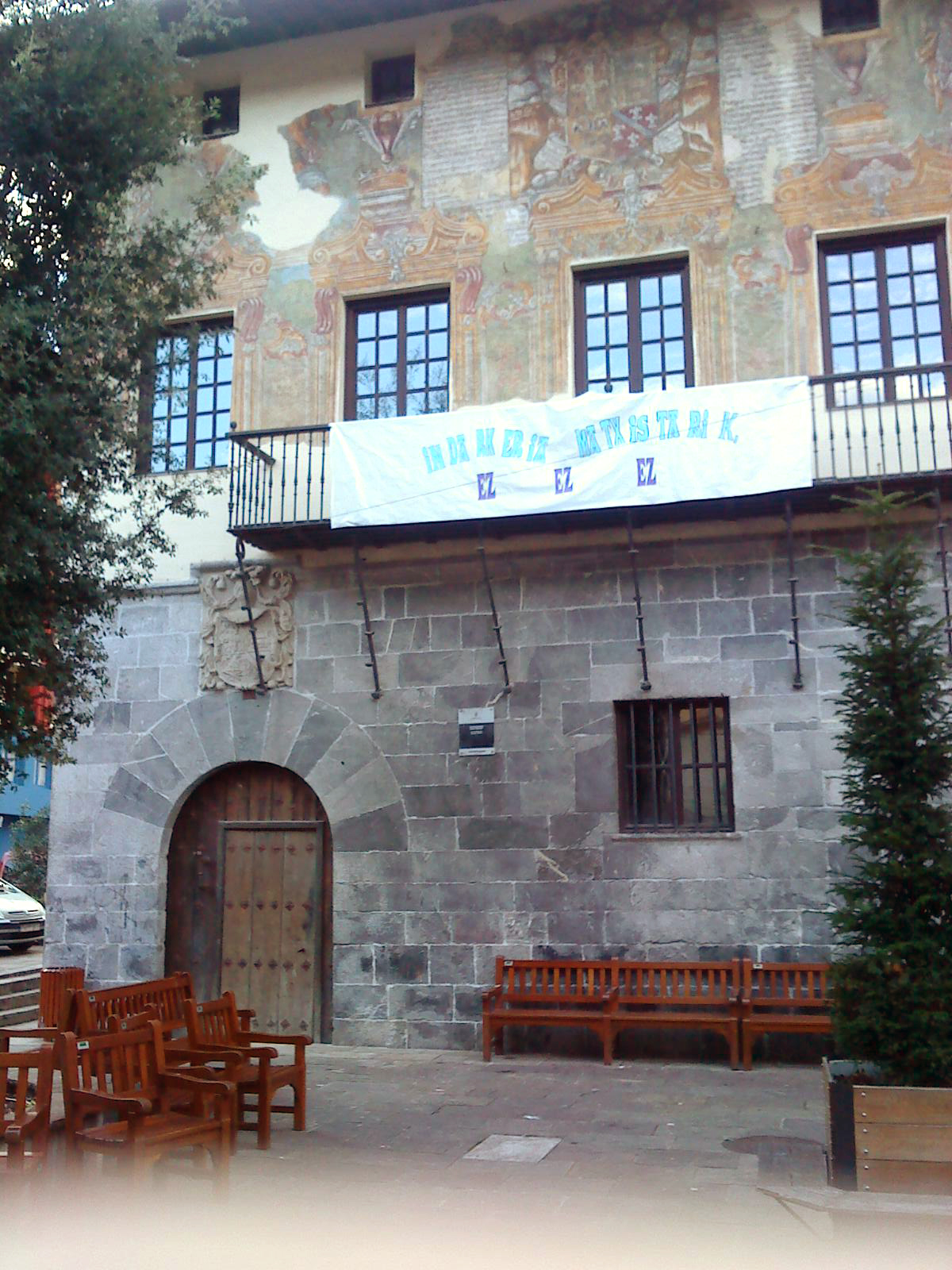 Villaro Areatza (Vizcaya, país vasco, España), Palacio de Gortazar o del Riscal.